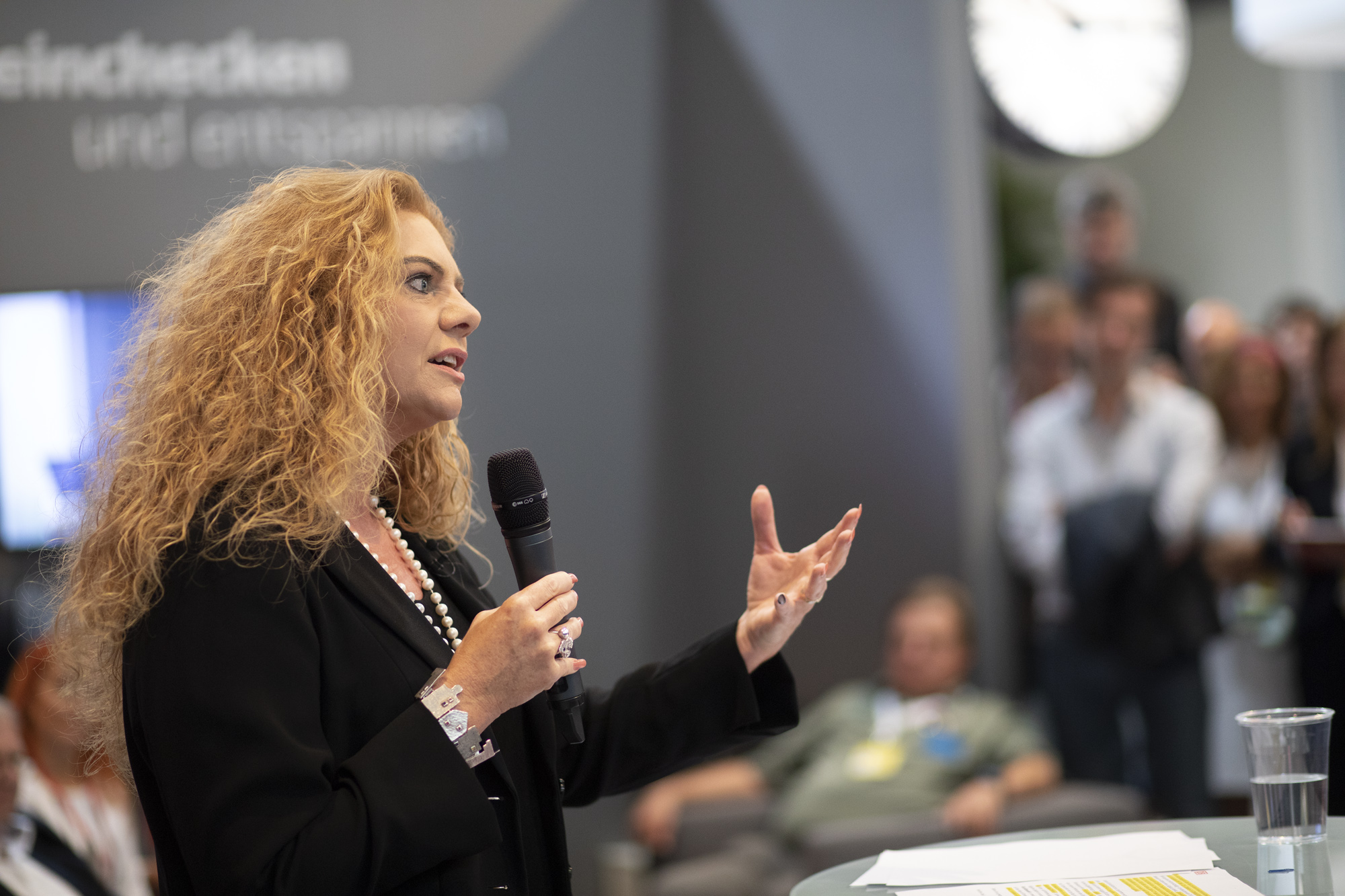 Prof. Dr. Sabina Jeschke, Vorstand Digitalisierung und Technik, auf der CEBIT2018.